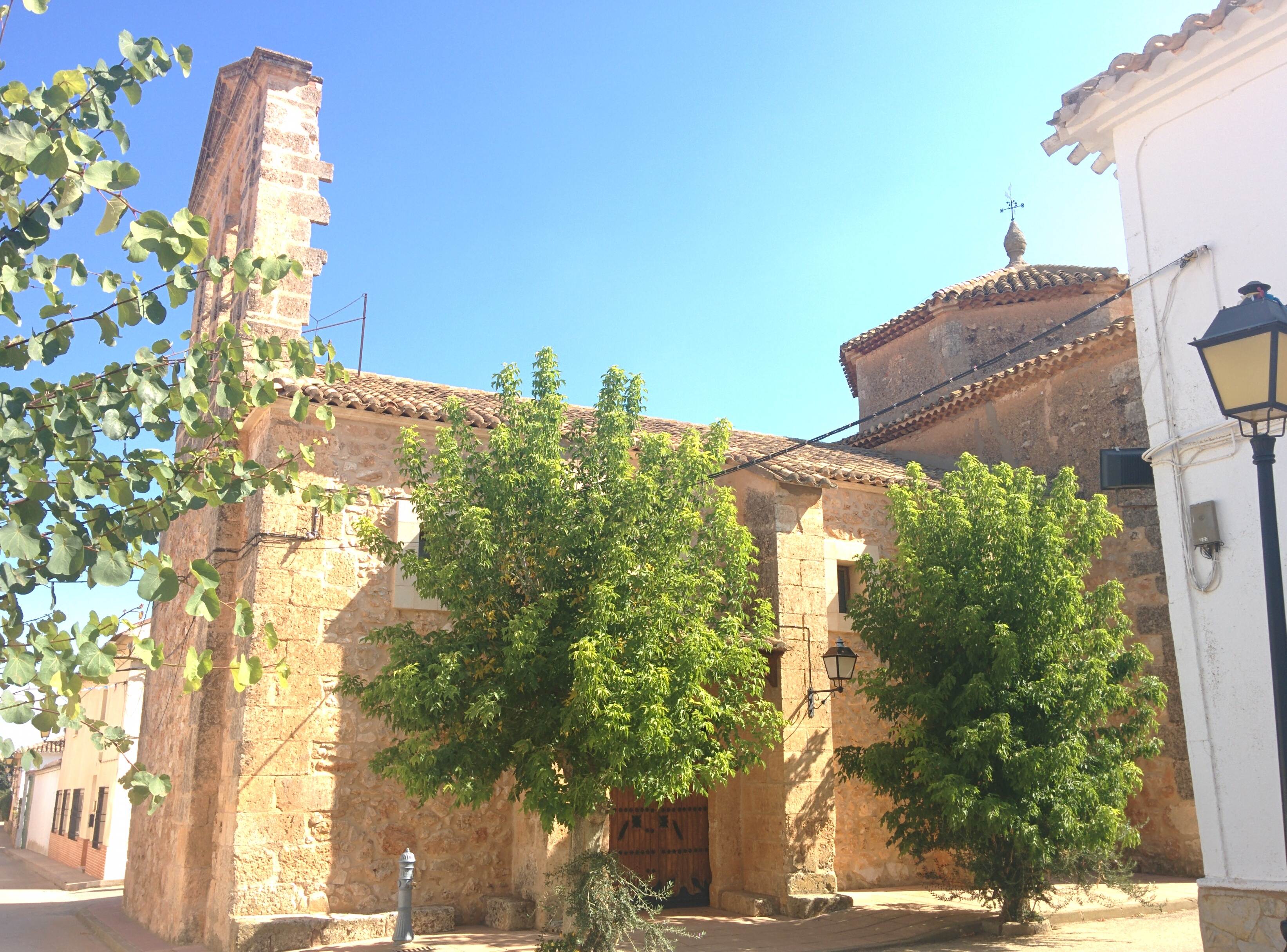 Iglesia del Dulce Nombre de Jesús, en Casas de Guijarro (Cuenca, España).